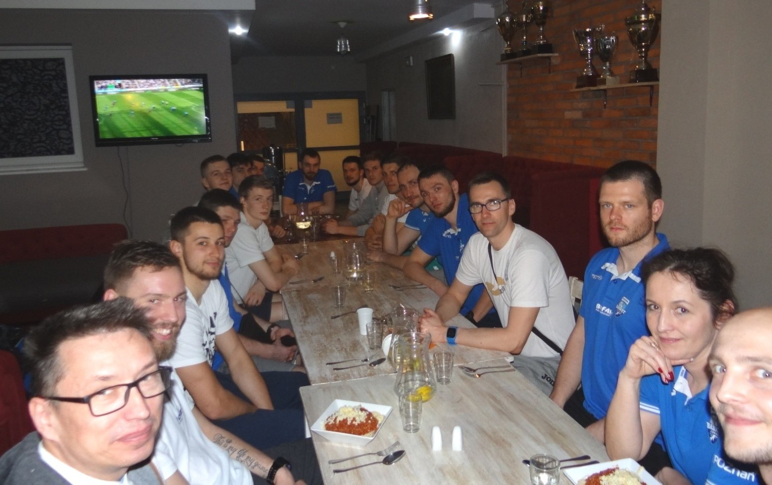 Pomeczowa kolacja Biofarmu Basket Poznań, 15.04.2018